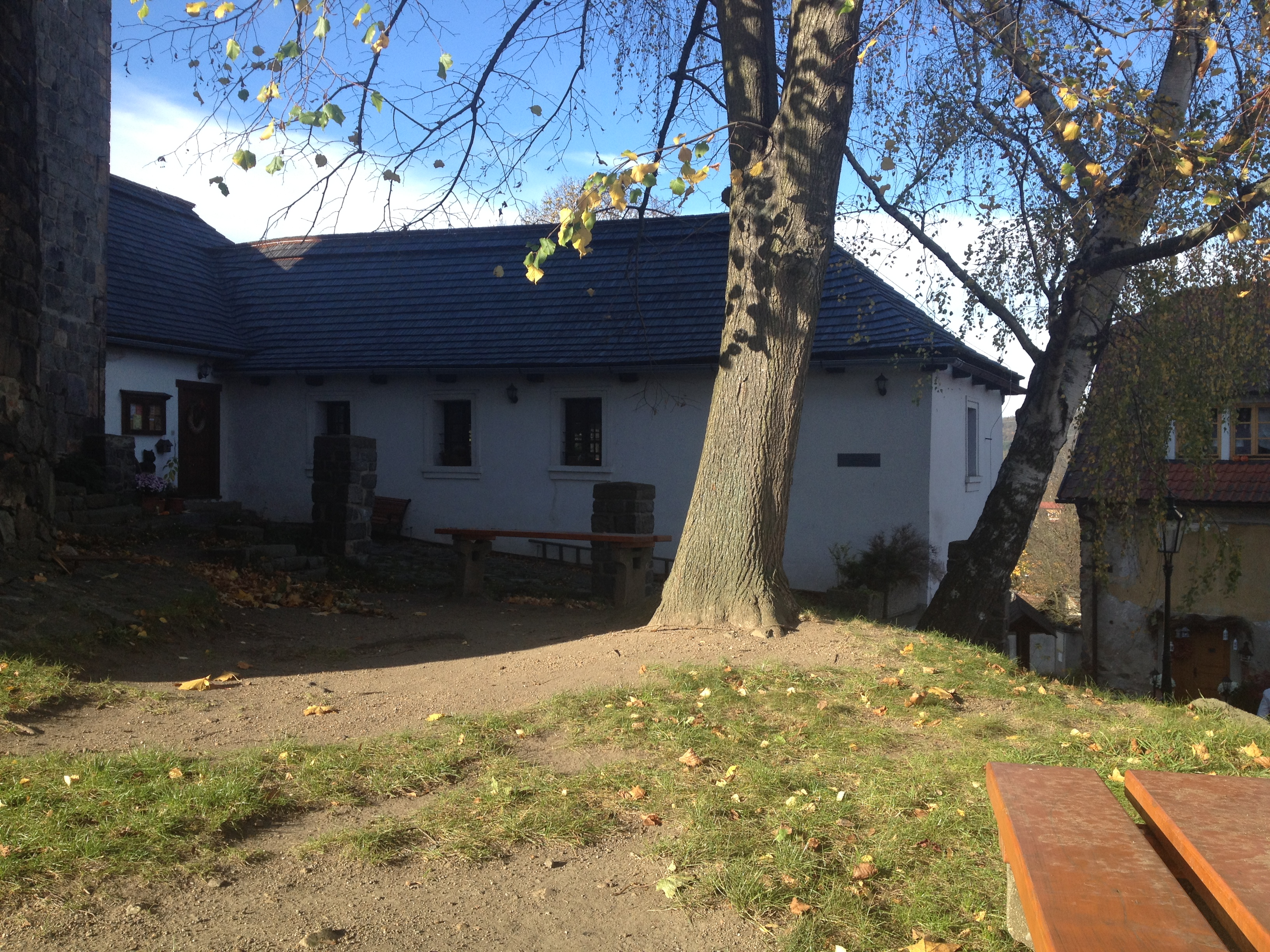 Přilehlé muzeum u týnecké rotundy, na základech renesančních prostor z 15. století